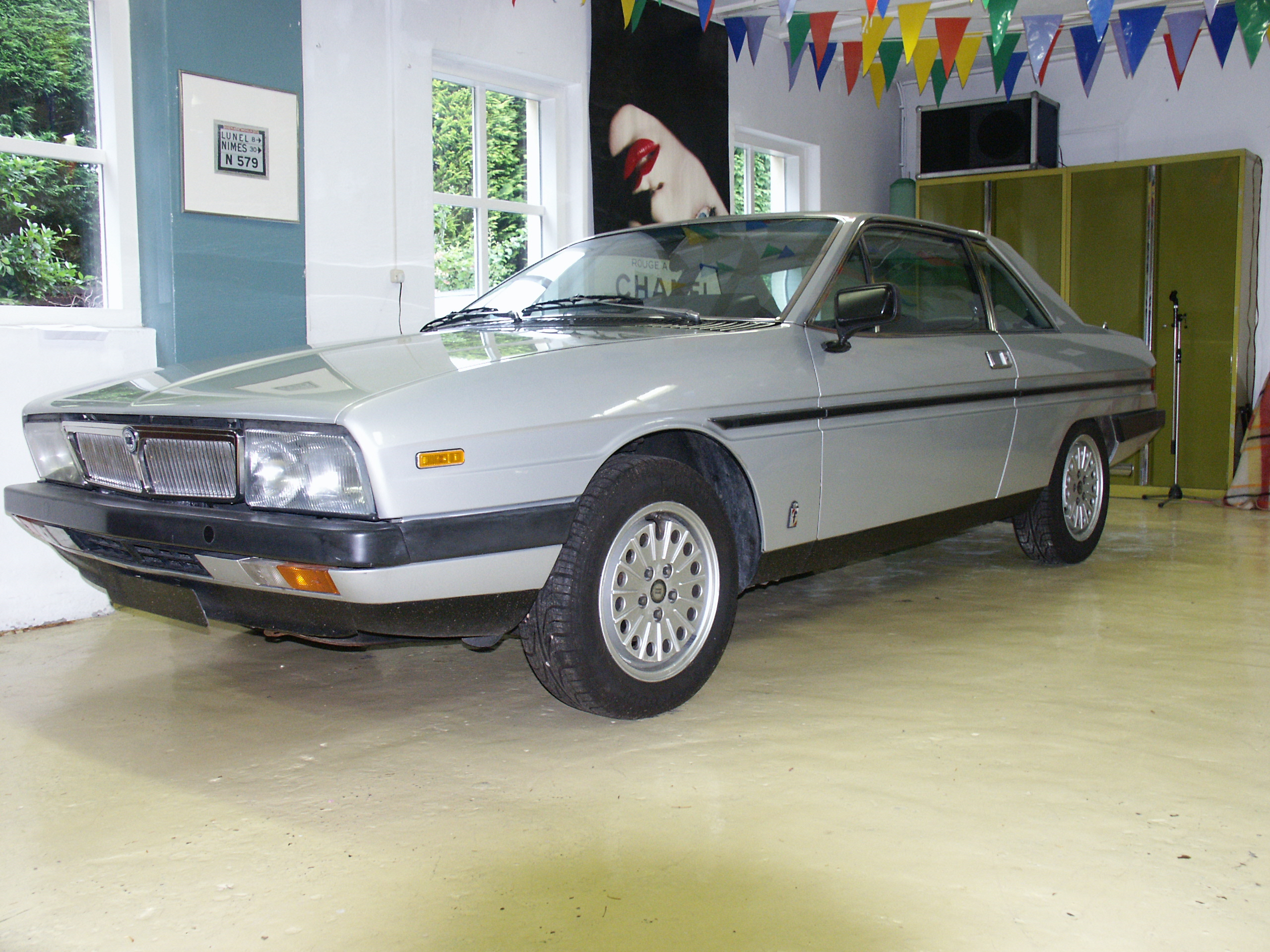 Lancia Gamma Coupé side view